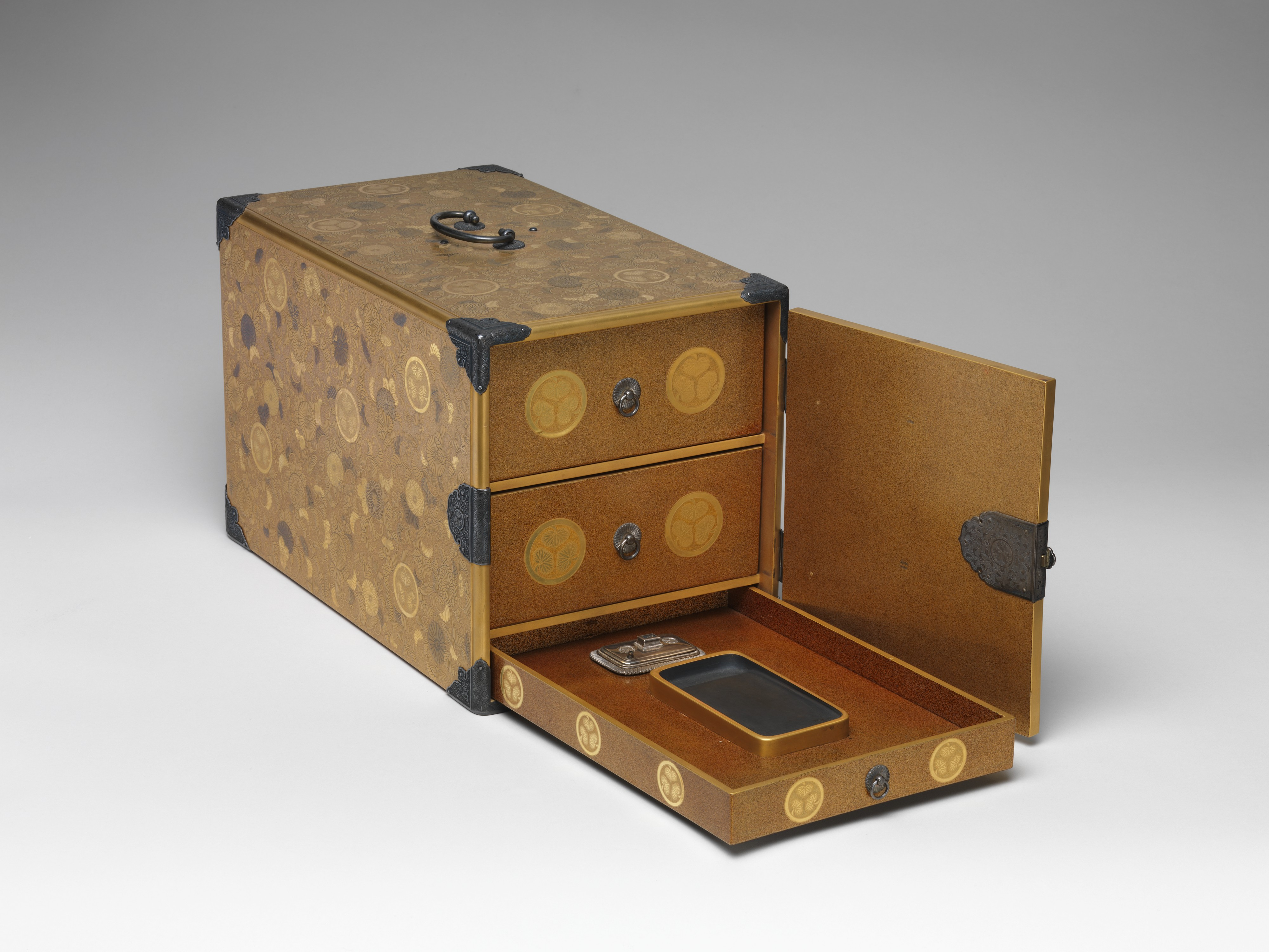 Japan; Cabinet; Lacquer